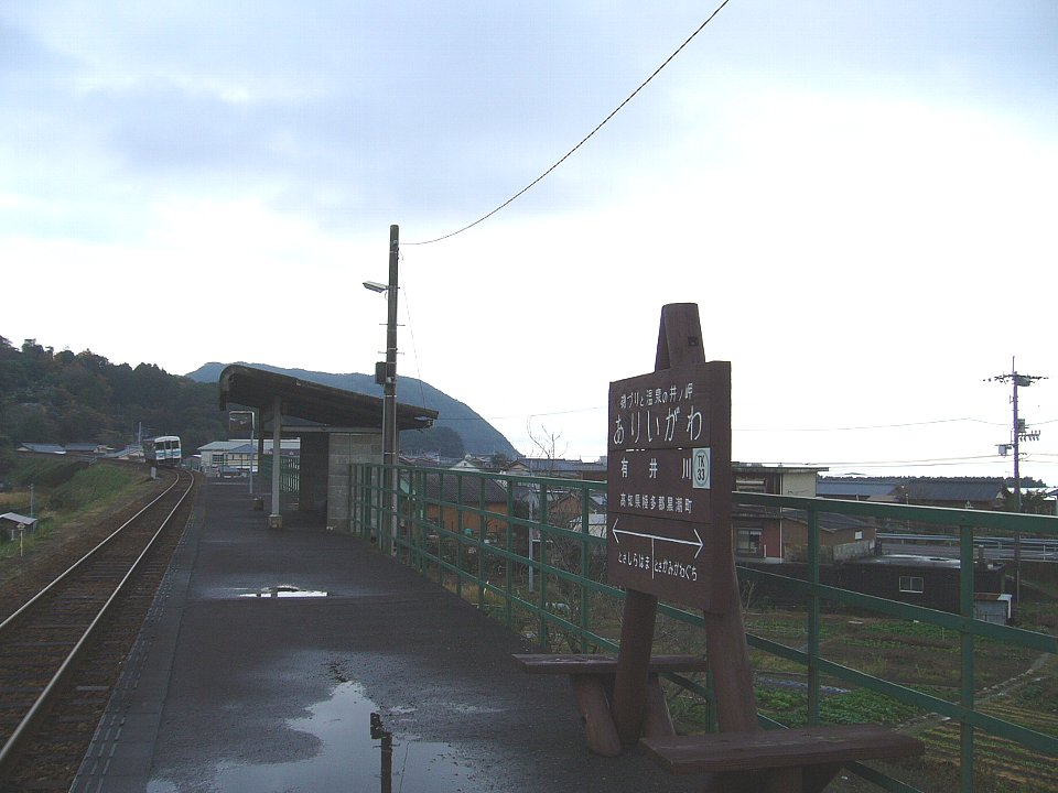 有井川駅